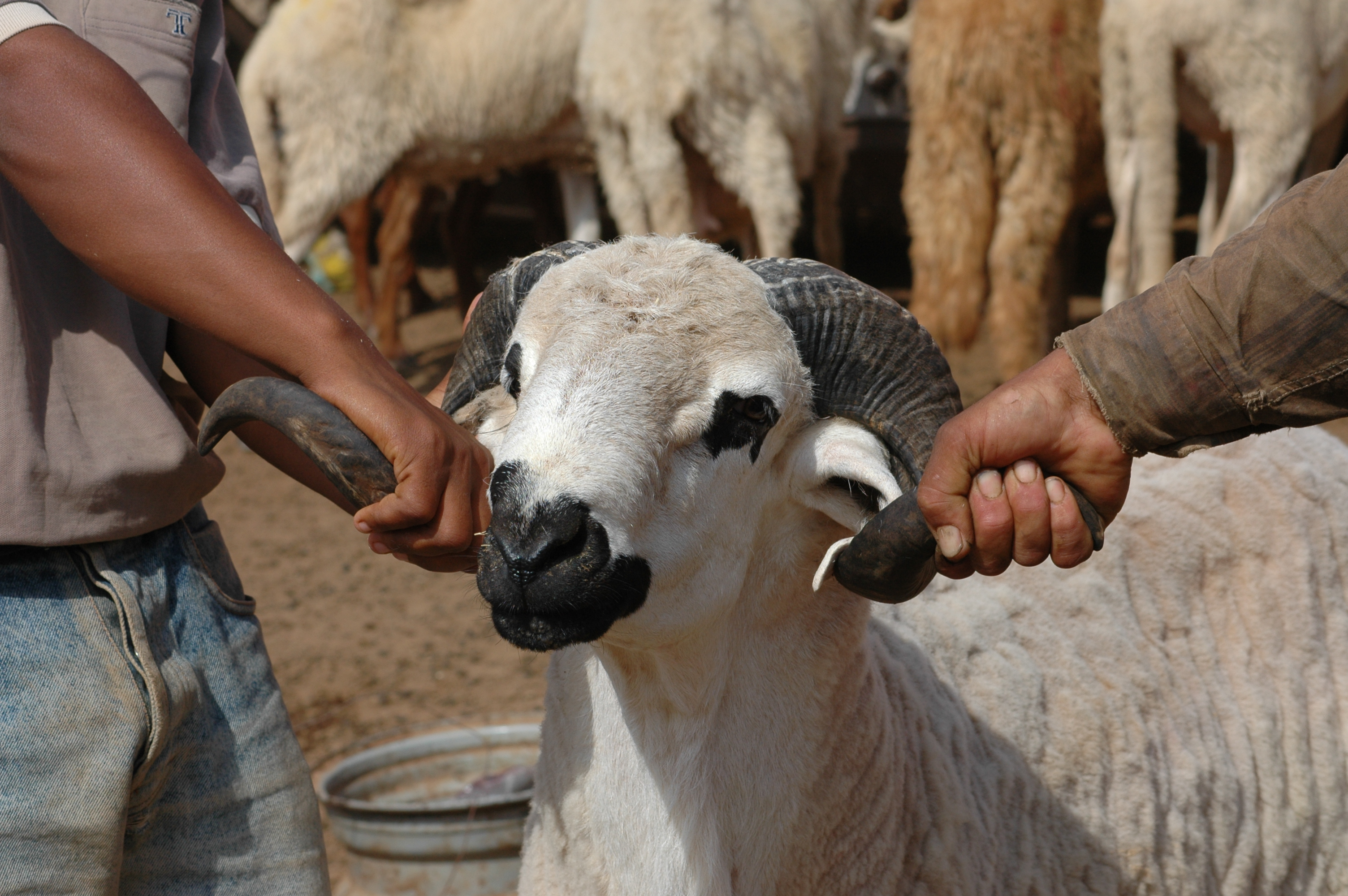 Bélier de race Sardi